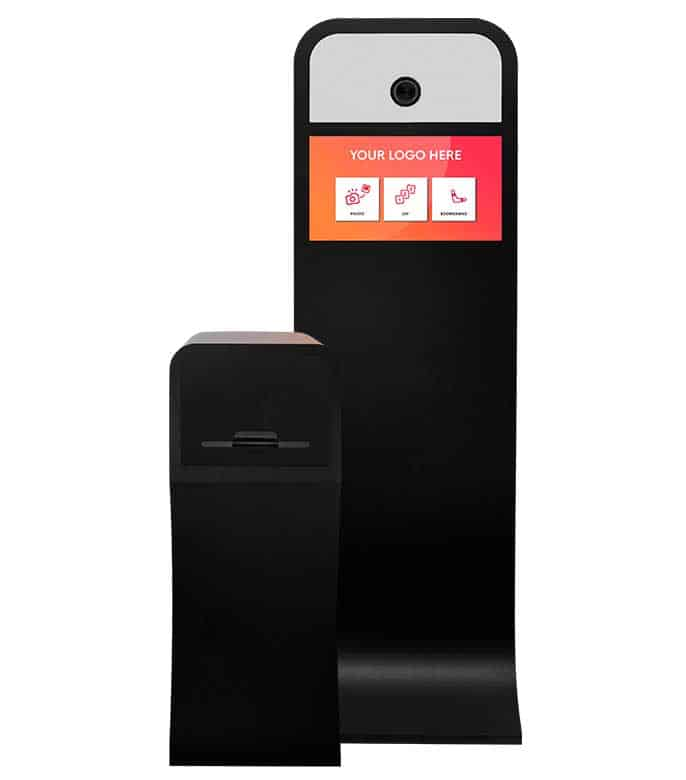 Eine moderne Variante der Fotobox mit Touchscreen und separatem Druck-Terminal.